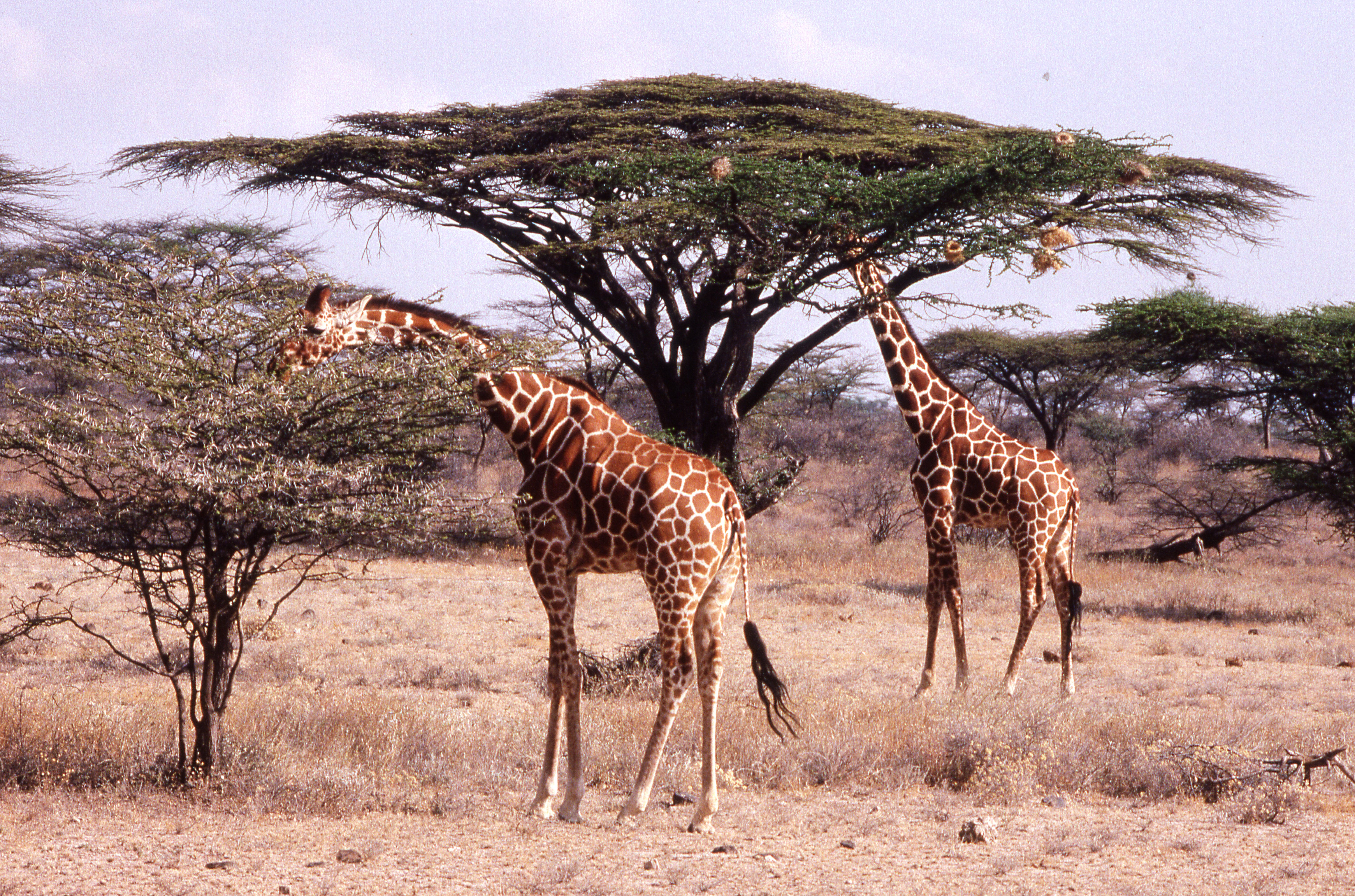 Stavo__est_kenya__47.jpg